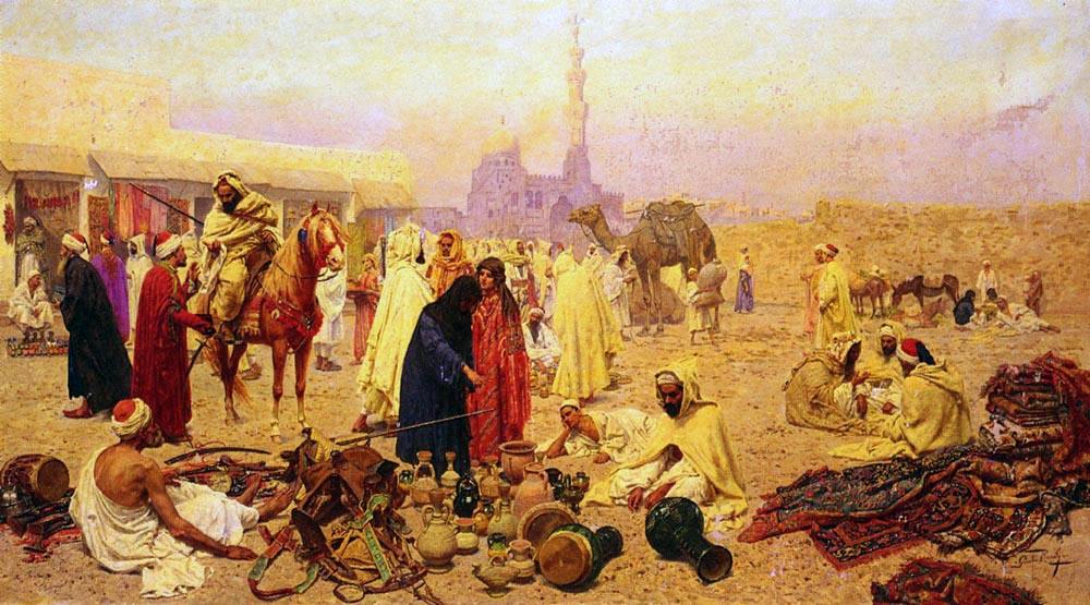 Un marché arabe.